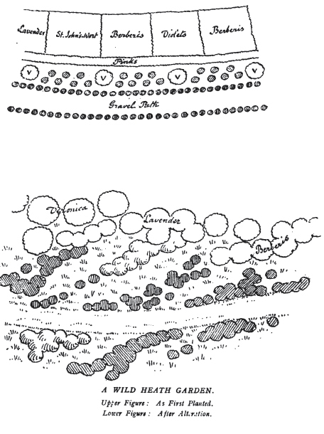 obrázek v knize Colour in the Flower Garden, vřesoviště